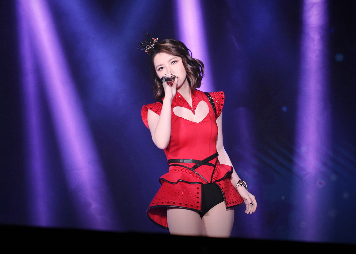 2018.01.13 QueenOfHearts 杭州站 (邓紫棋 杭州演唱会)